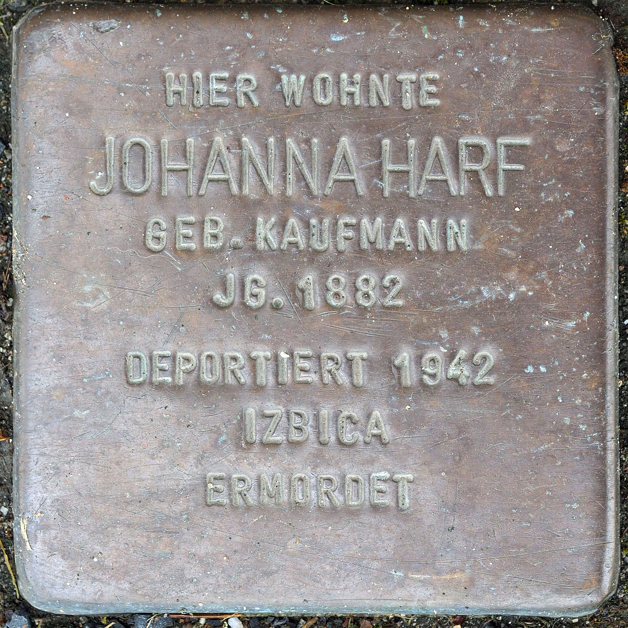 Stolpersteine MG: Harf, Johanna